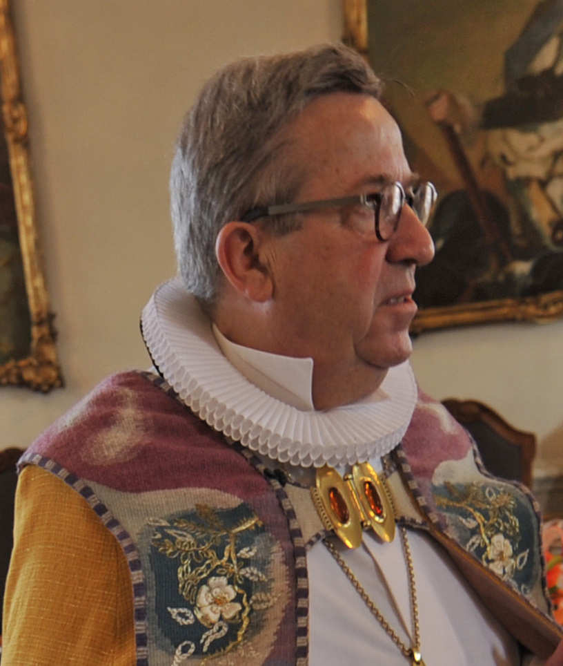 Biskop Søren Lodberg Hvas fra Aalborg ved sin afskedsreception.